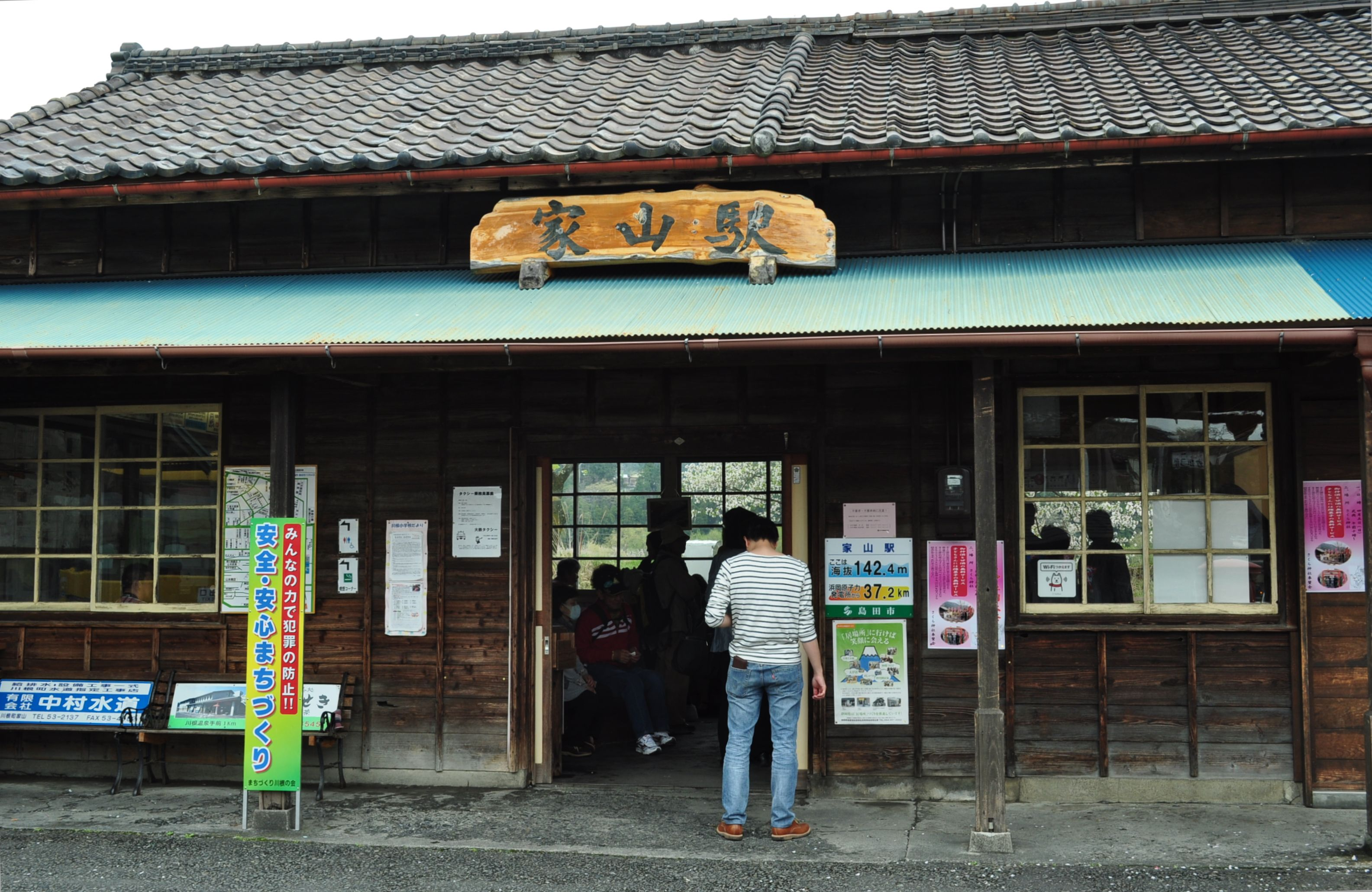 （2015年4月4日撮影）